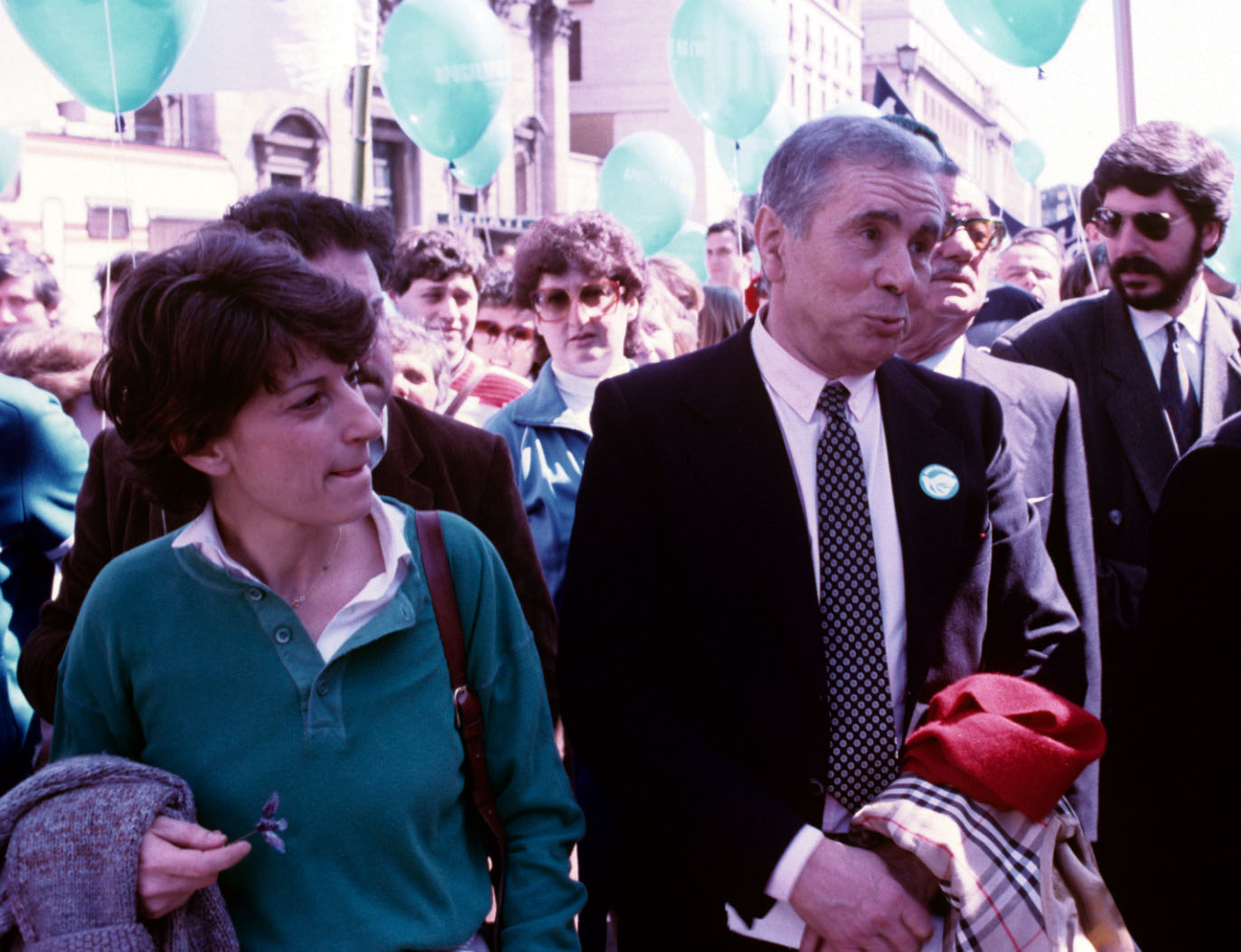 Adelaide Aglietta con Enzo Tortora alla Marcia contro la Fame, Roma, da piazza Trinità dei Monti a piazza san Pietro.